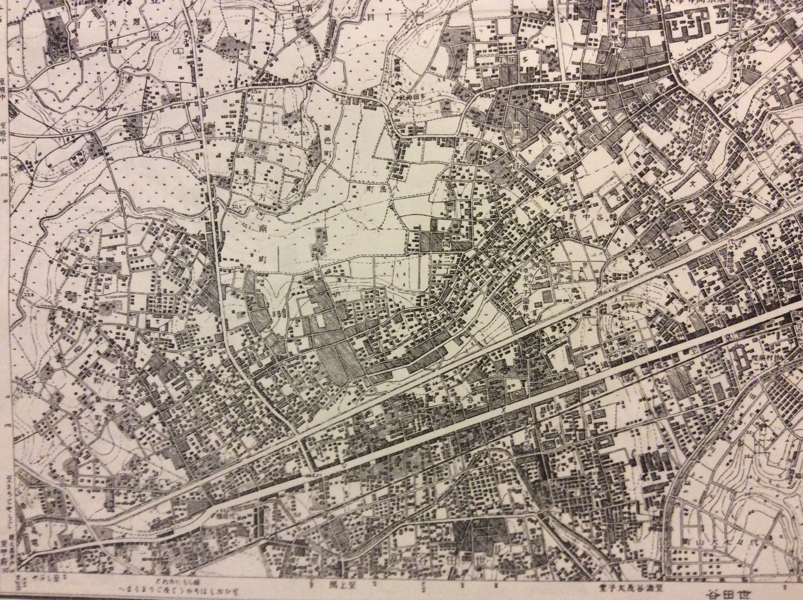 昭和14年、1万分1地形図（2014年12月24日撮影）